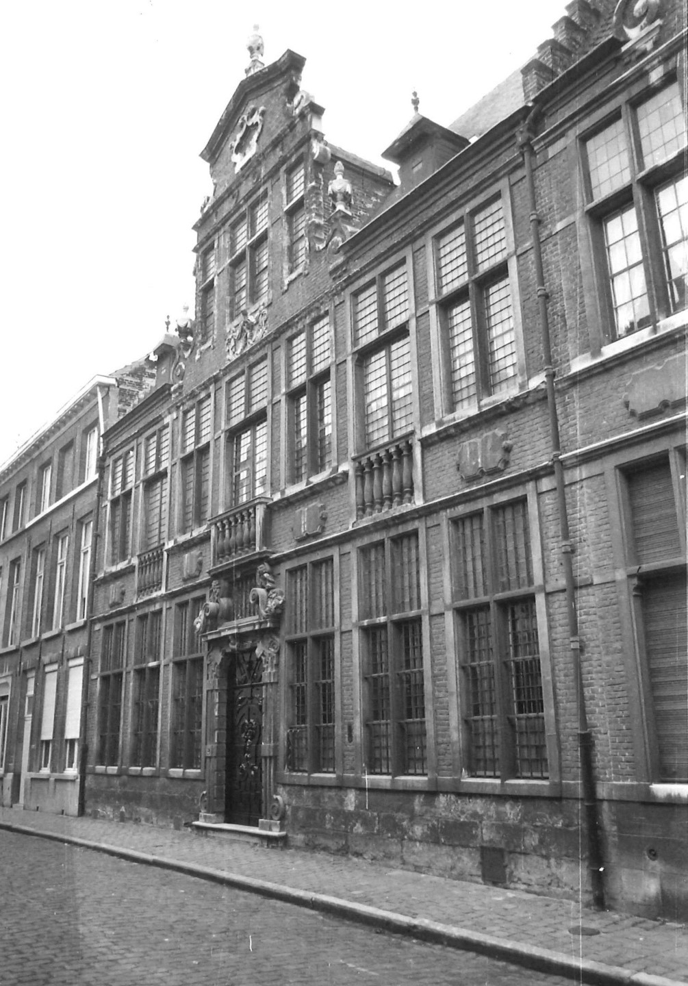 Gent Sint Katelijnestraat 11